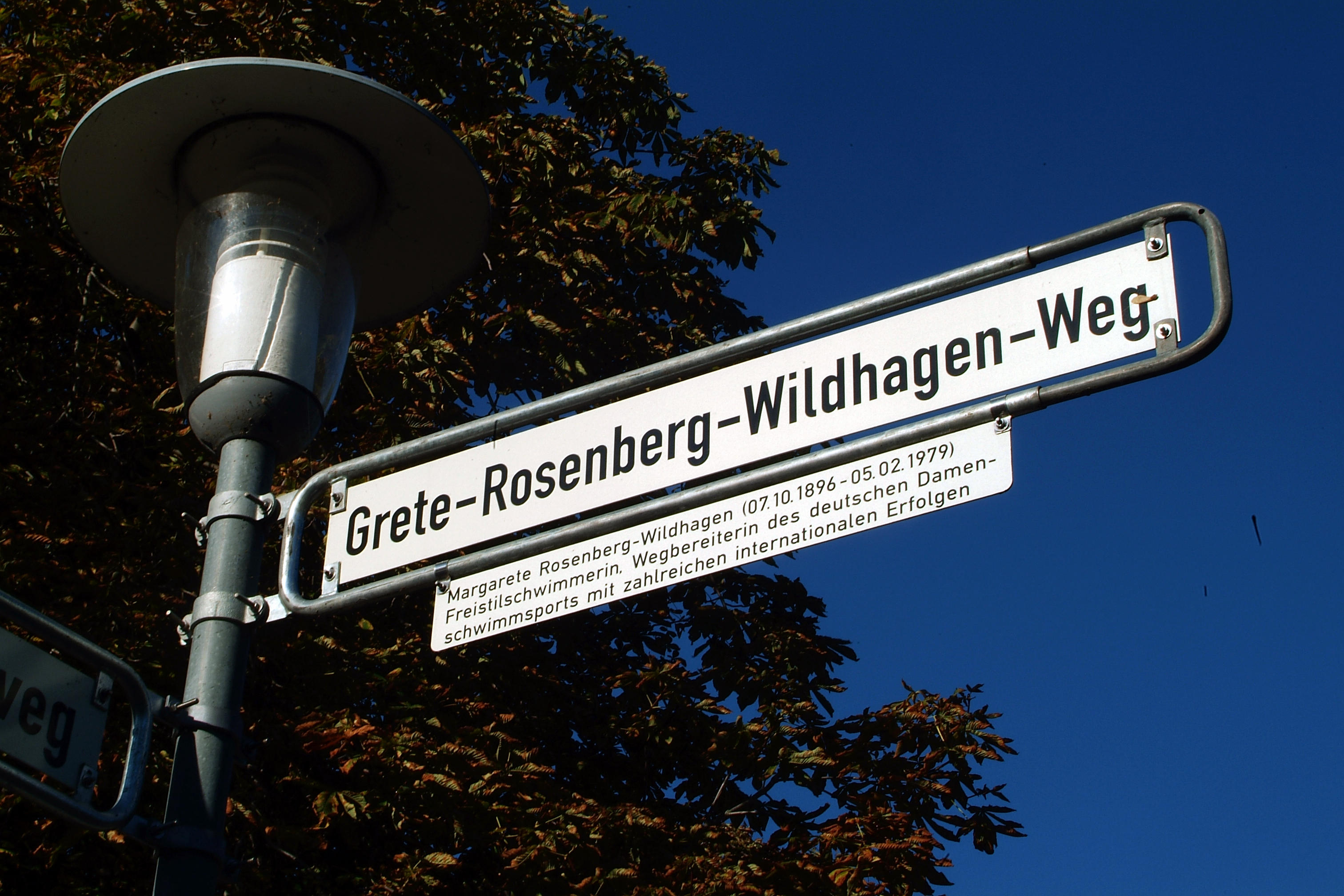 Im Sportpark hinter den Gebäuden des LandesSportBunds Niedersachsen erläutert eine gesonderte Legendentafel am Straßenschild Grete-Rosenberg-Wildhagen-Weg: „Margarete Rosenberg-Wildhagen (07.10.1895 - 05.02.1979), Freischwimmerin. Wegbereiterin des deutschen Damenschwimmsports mit zahlreichen internationalen Erfolgen“ ...